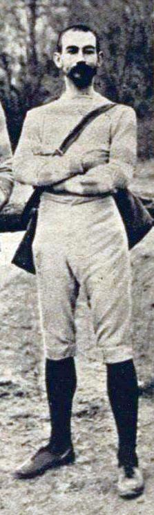 Maurice Dezaux, du Racing Club de France, né le 16-10-1864 à Paris et décédé le 19-03-1919 à Saint-Mandrier, champion de France d'athlétisme du 1500 mètres en 1888 (1ère édition du championnat), et du 4000 steeple en 1888 et 1890. Devint par la traceur de parcours de cross-country, souvent avec Gaston Raymond.